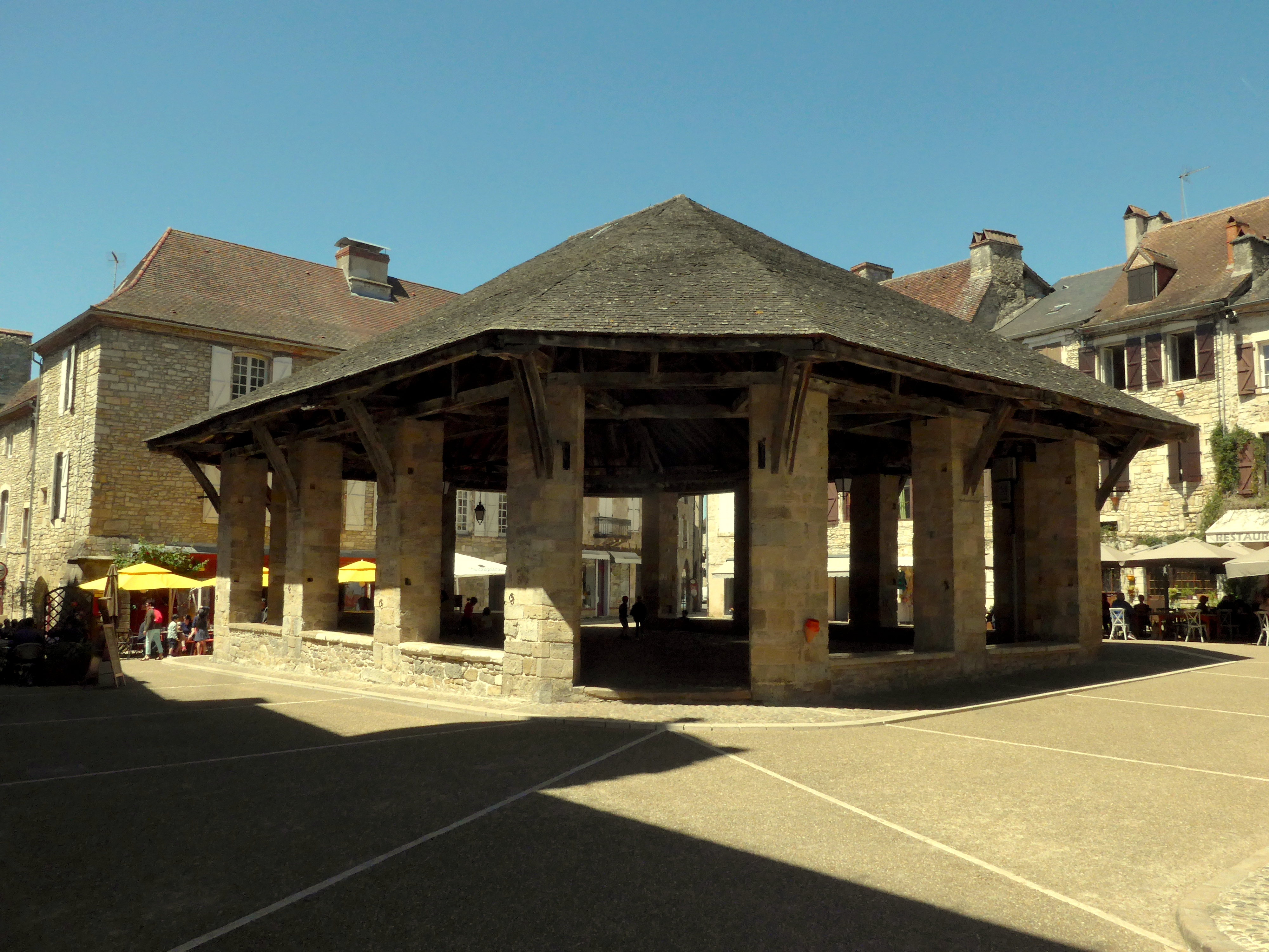 De in de jaren 1797 tot 1800 gebouwde markthal is geregistreerd als een historisch monument op 11-10-2004 [1]